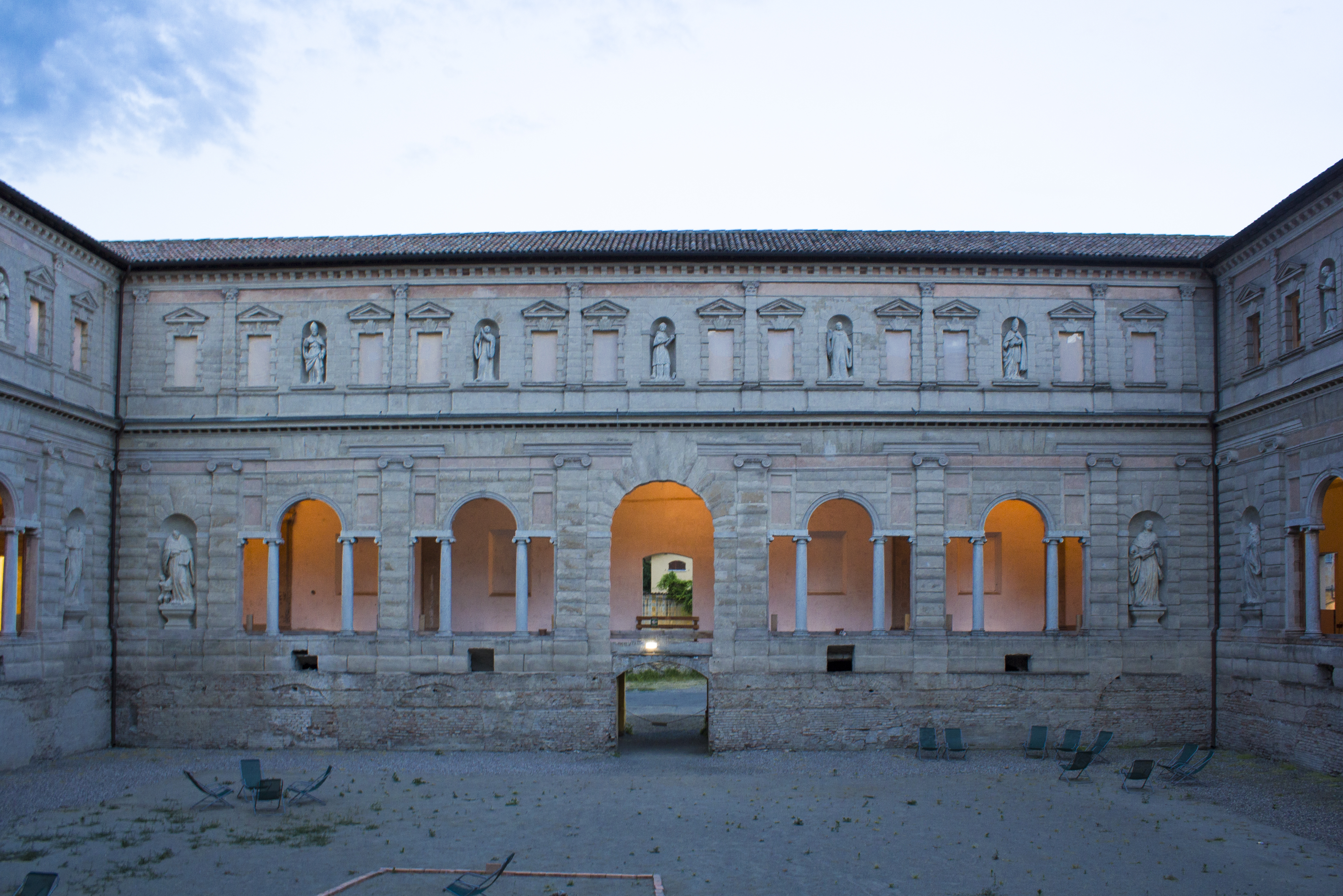 Chiostri di San Pietro This is a photo of a monument which is part of cultural heritage of Italy.